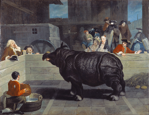 Rhinoceros in Venice